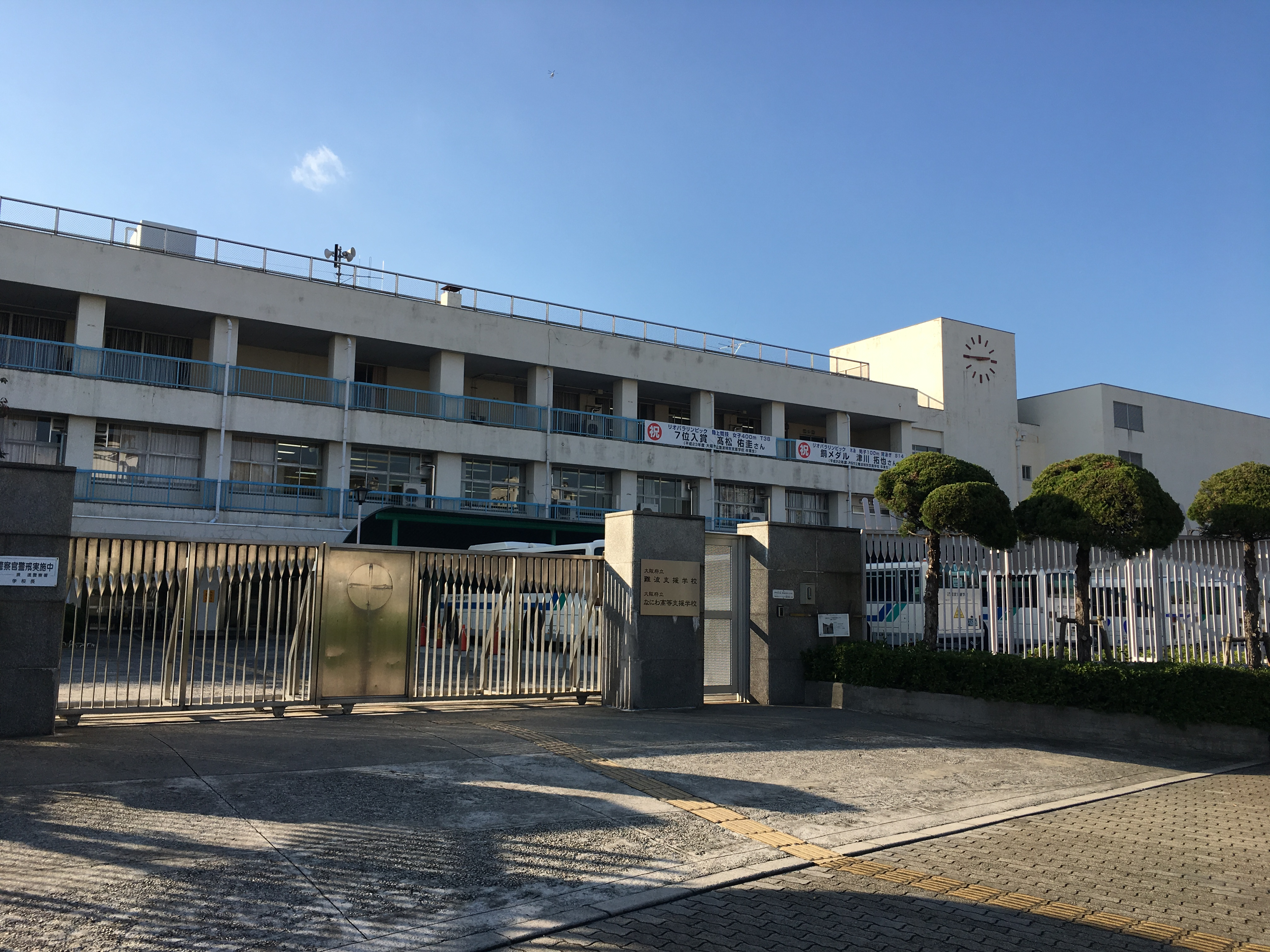 大阪府立難波支援学校